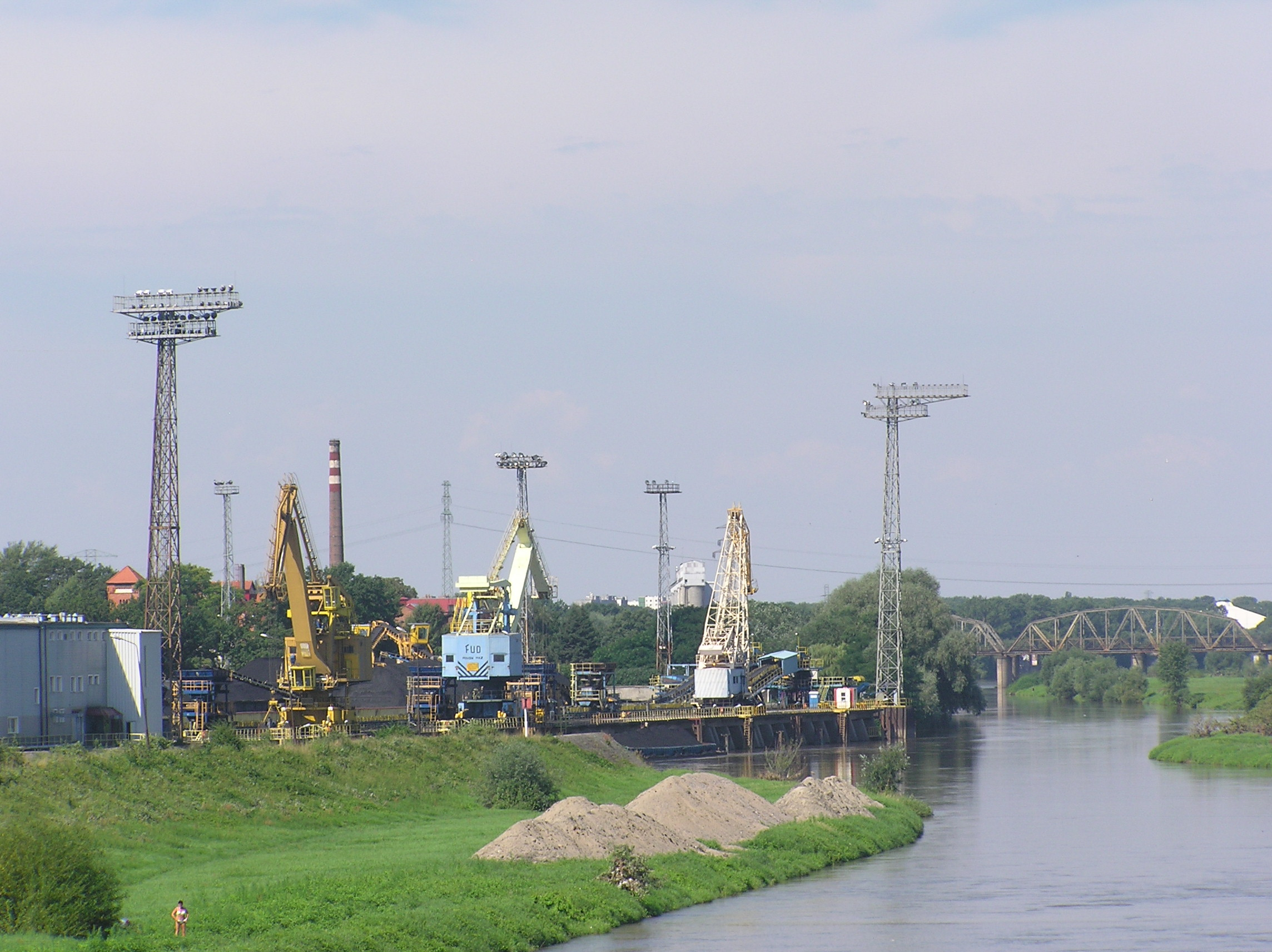 Wrocław, Kleczków, Odra - Kanał Miejski/Stara Odra, Przeładownia Elektrociepłowni Wrocław